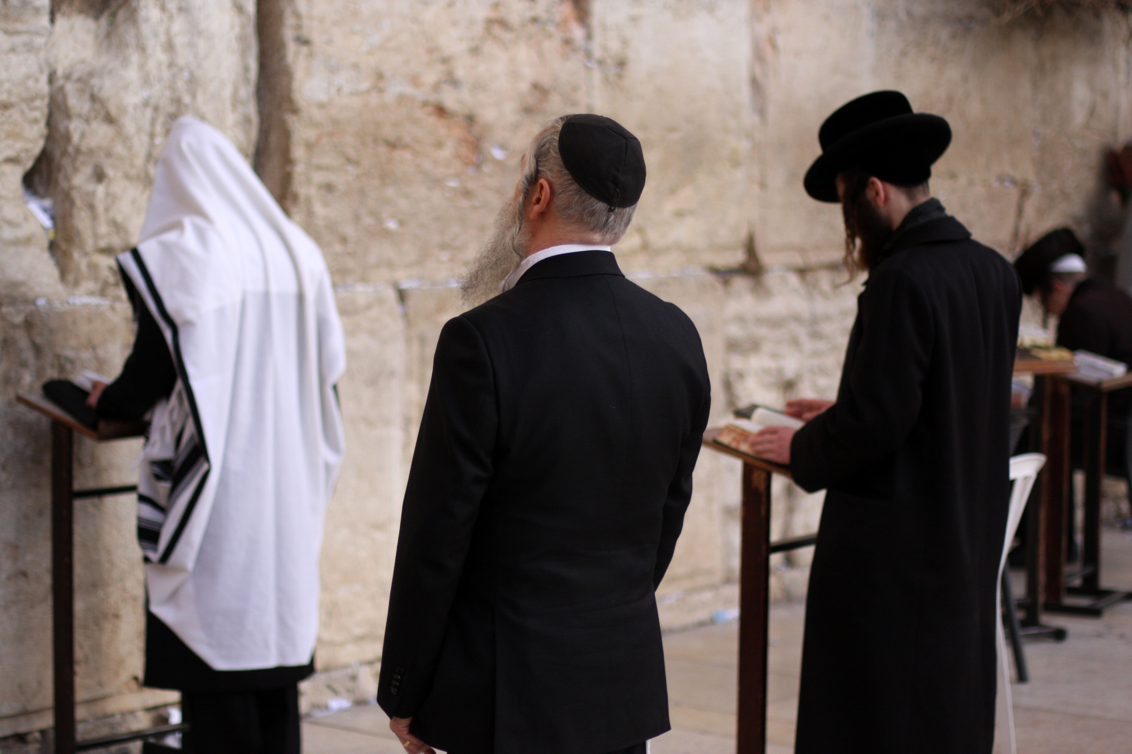 Western Wall, Jerusalem